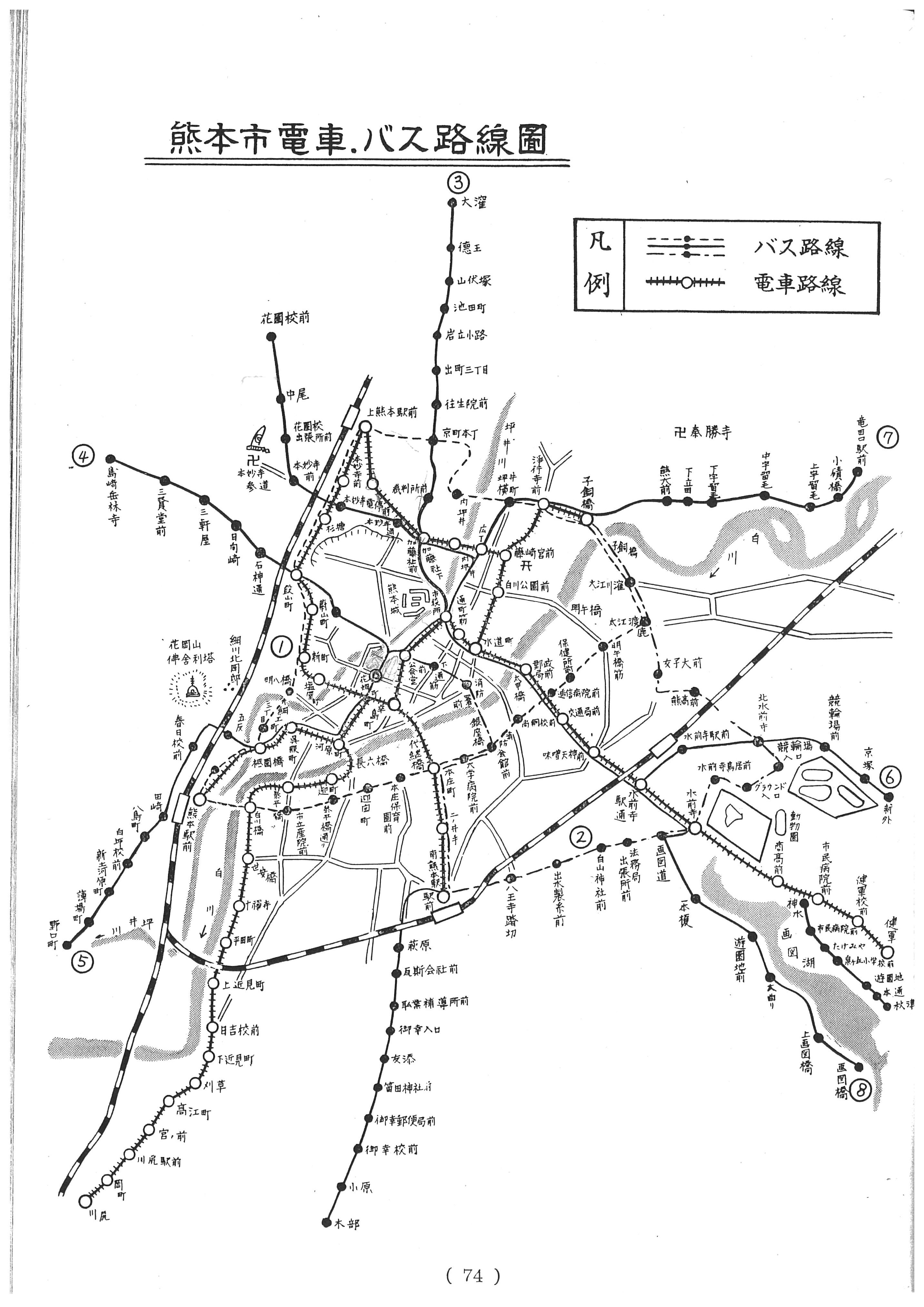 1956年ごろの熊本市電・バス路線図